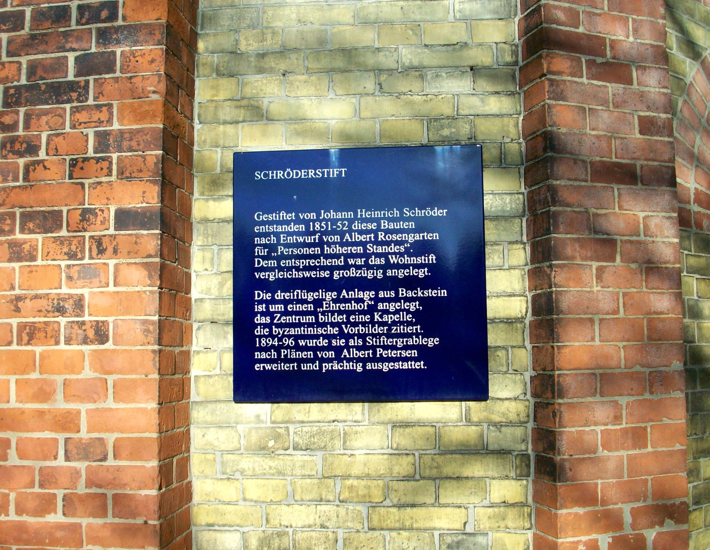 Gedenktafel am Schröderstift, Schröderstiftstrasse 34, Hamburg-Eimsbüttel.